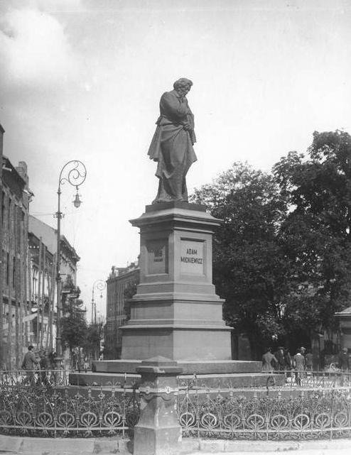 Widok ogólny pomnika Adama Mickiewicza, według projektu Tomasza Dykasa (1850-1910).